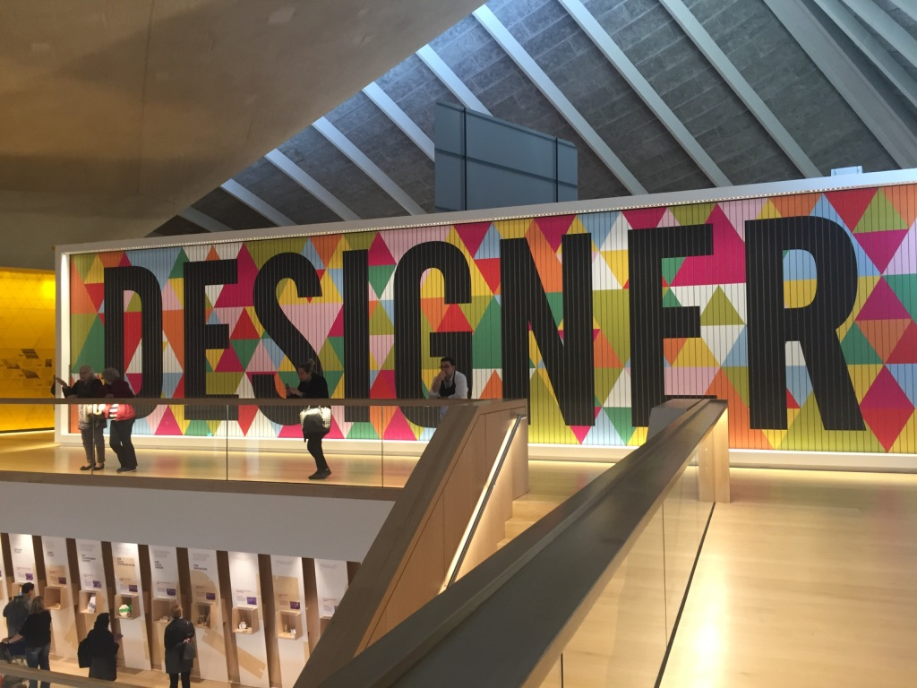 Interior del Museo del Diseño- Southwark en Londres, Reino Unido.